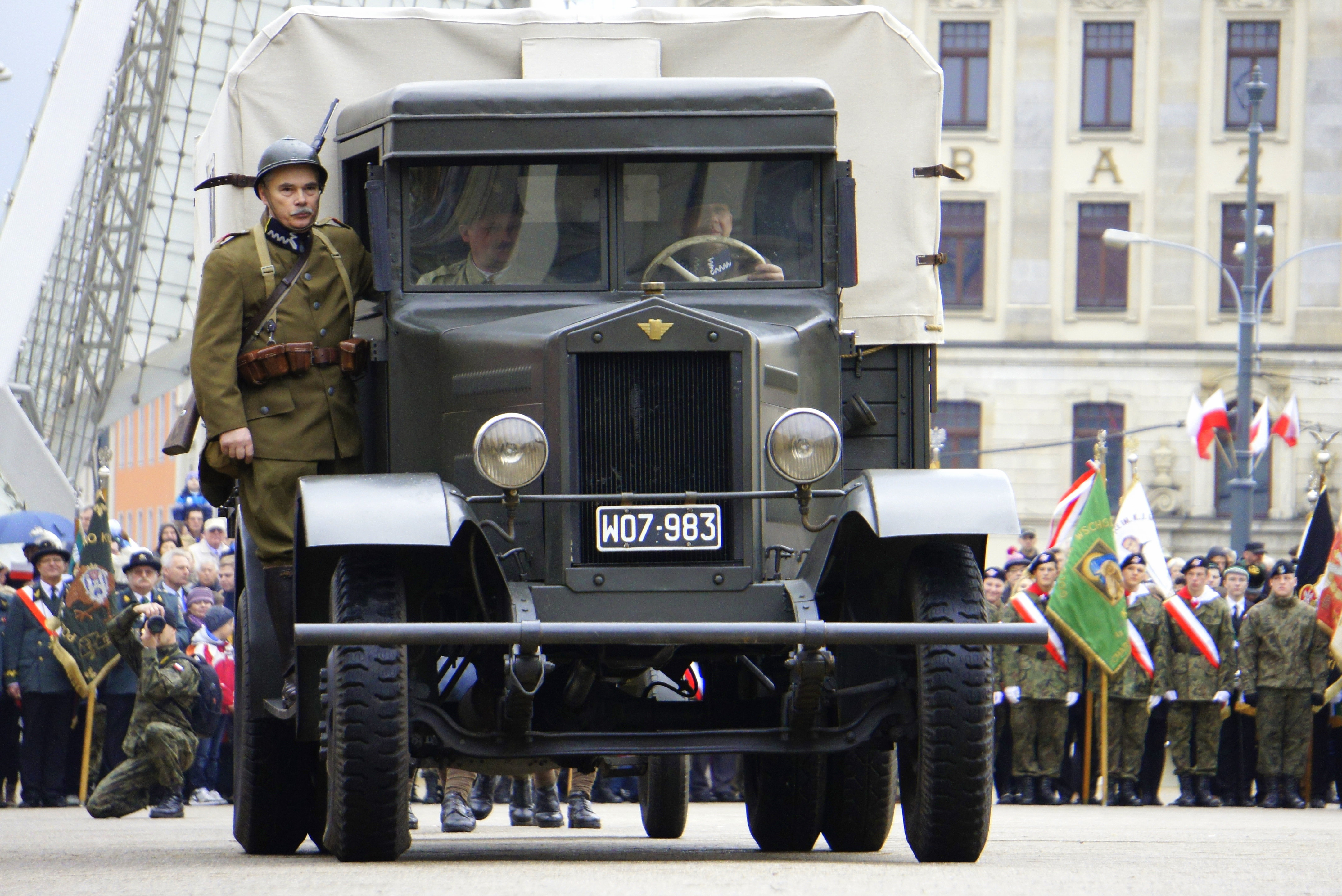 Poznań. Polski Fiat PF-621L (replika) podczas prezentacji w dniu Narodowego Święta Niepodległości. Pojazd został zrekonstruowany przez członków Wronieckiego Stowarzyszenia Historycznego - Historica. Tablica rejestracyjna wojskowa (1938–1944).